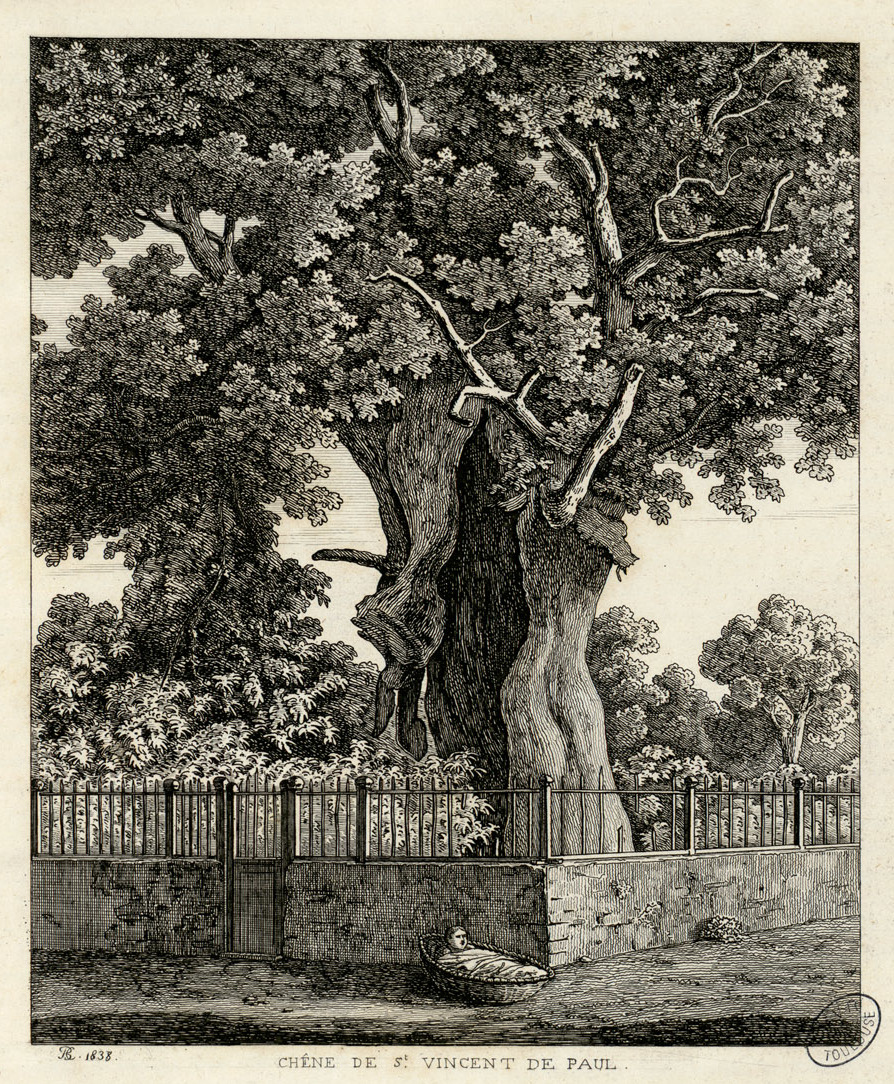 Fait partie d'un recueil des 36 premiers numéros du Pélerin, chaque numéro étant accompagné d'une gravure Ancely, René (1876 - 1966). Possesseur